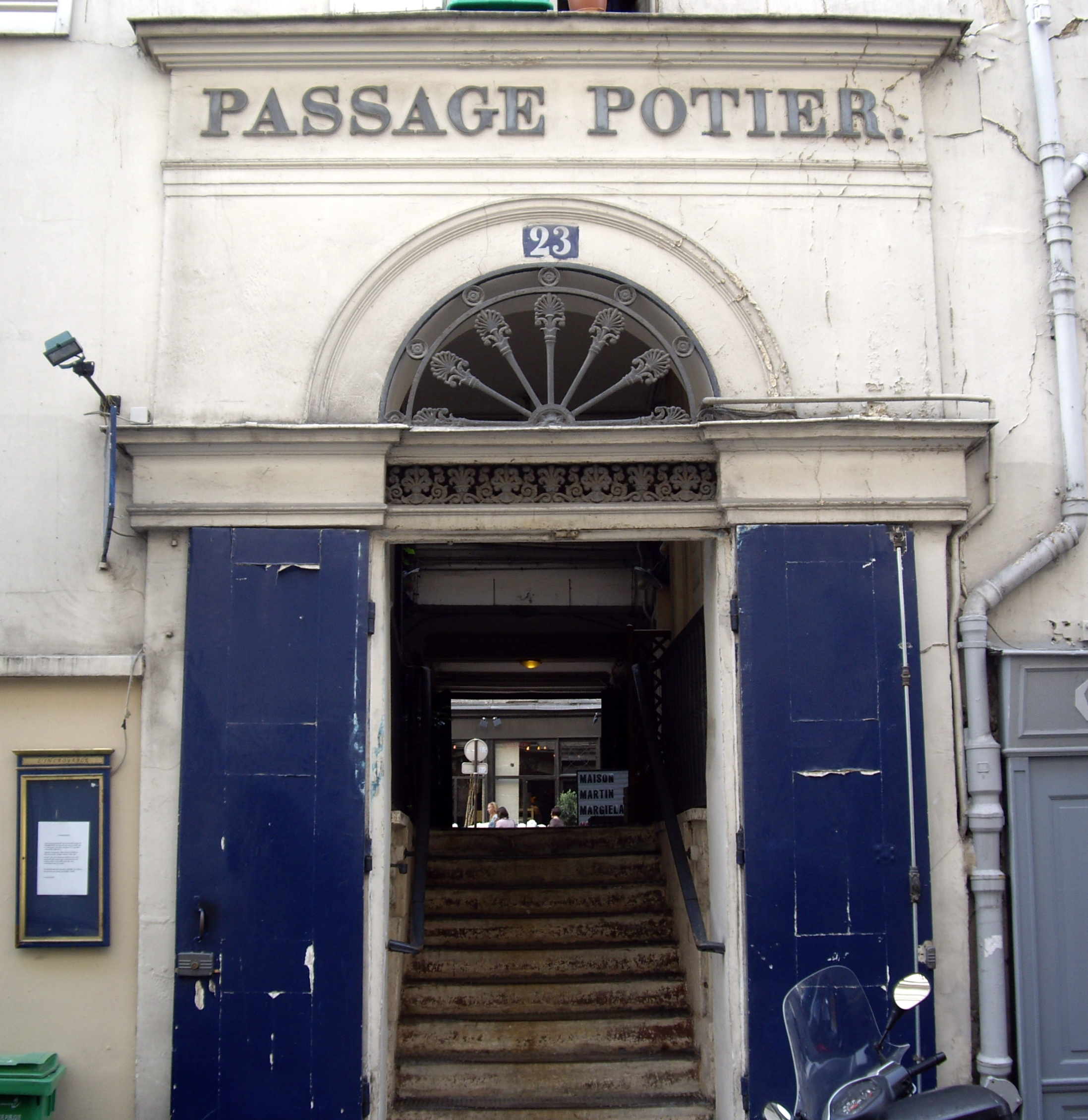 Passage Potier, Paris 1er. Entrée au n° 23 de la rue de Montpensier. Au fond, la rue de Richelieu.